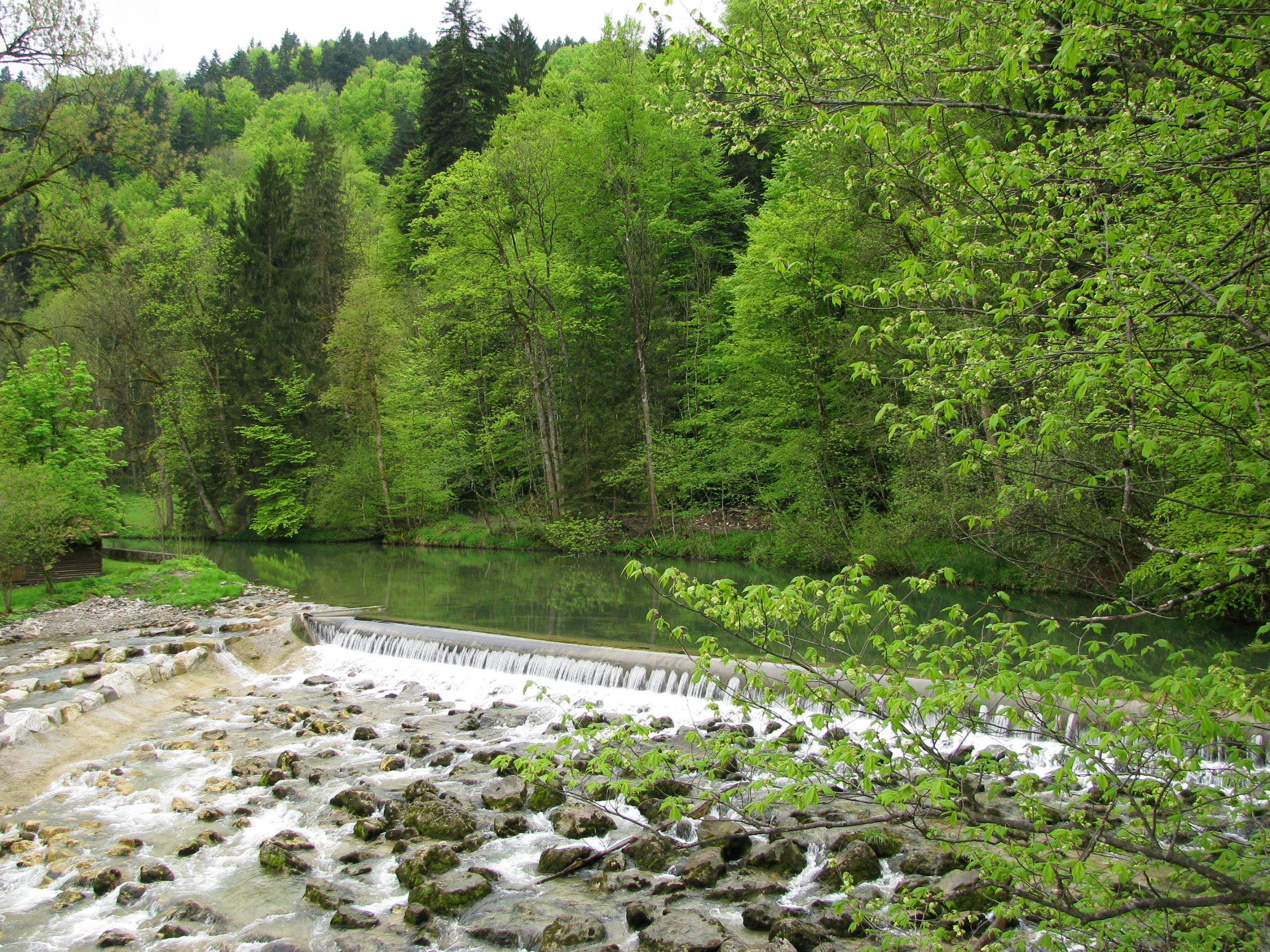 Die Leitzach bei der Leitzachmühle in Miesbach.